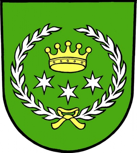 znak obce Dolany